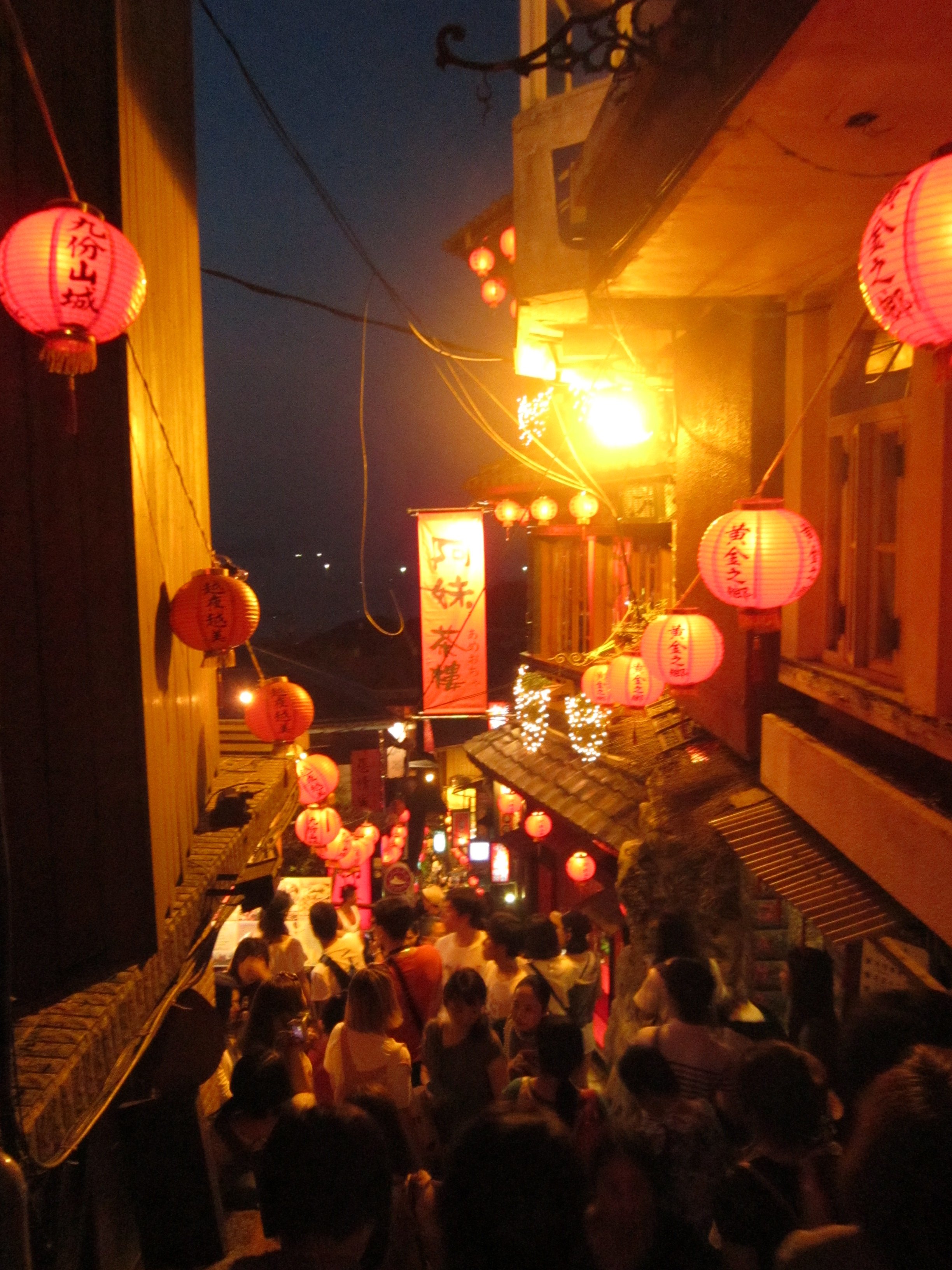 九份老街夜景